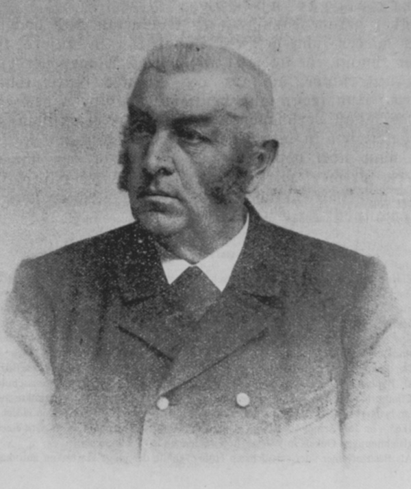 Friedrich Hartmann (1841–1901), Reichstagsmitglied. Foto reproduziert in Württembergisch Franken 75, Schwäbisch Hall 1991, S. 266.